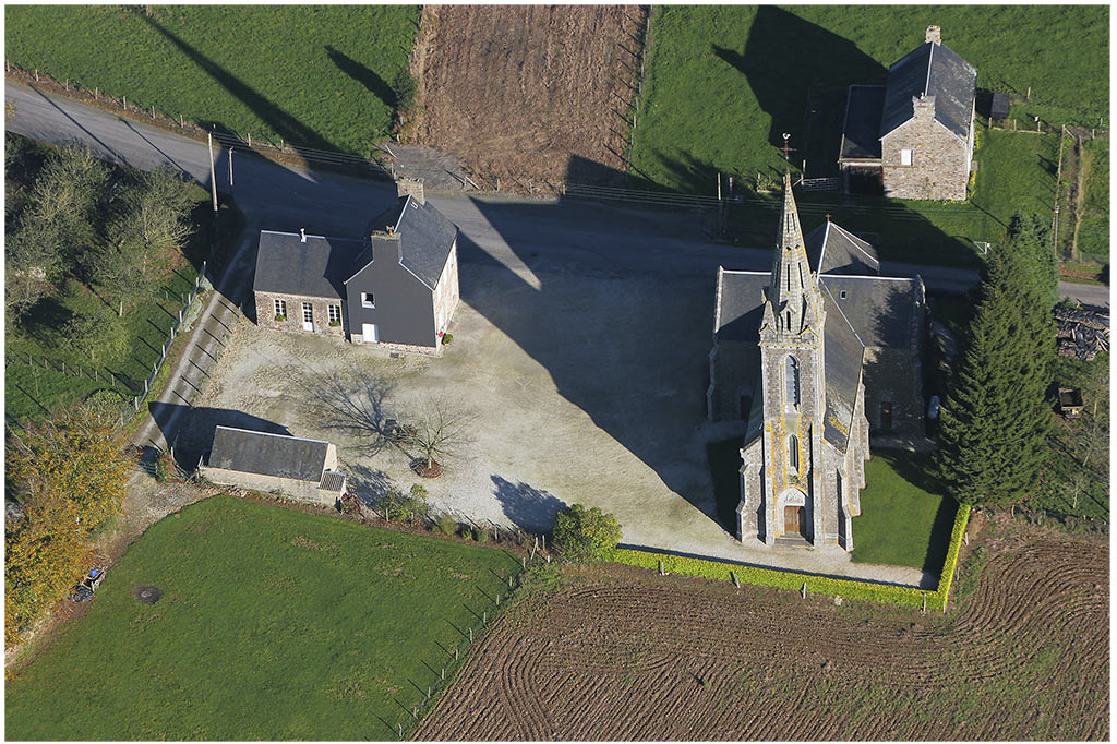 Rancoudray vu du ciel.